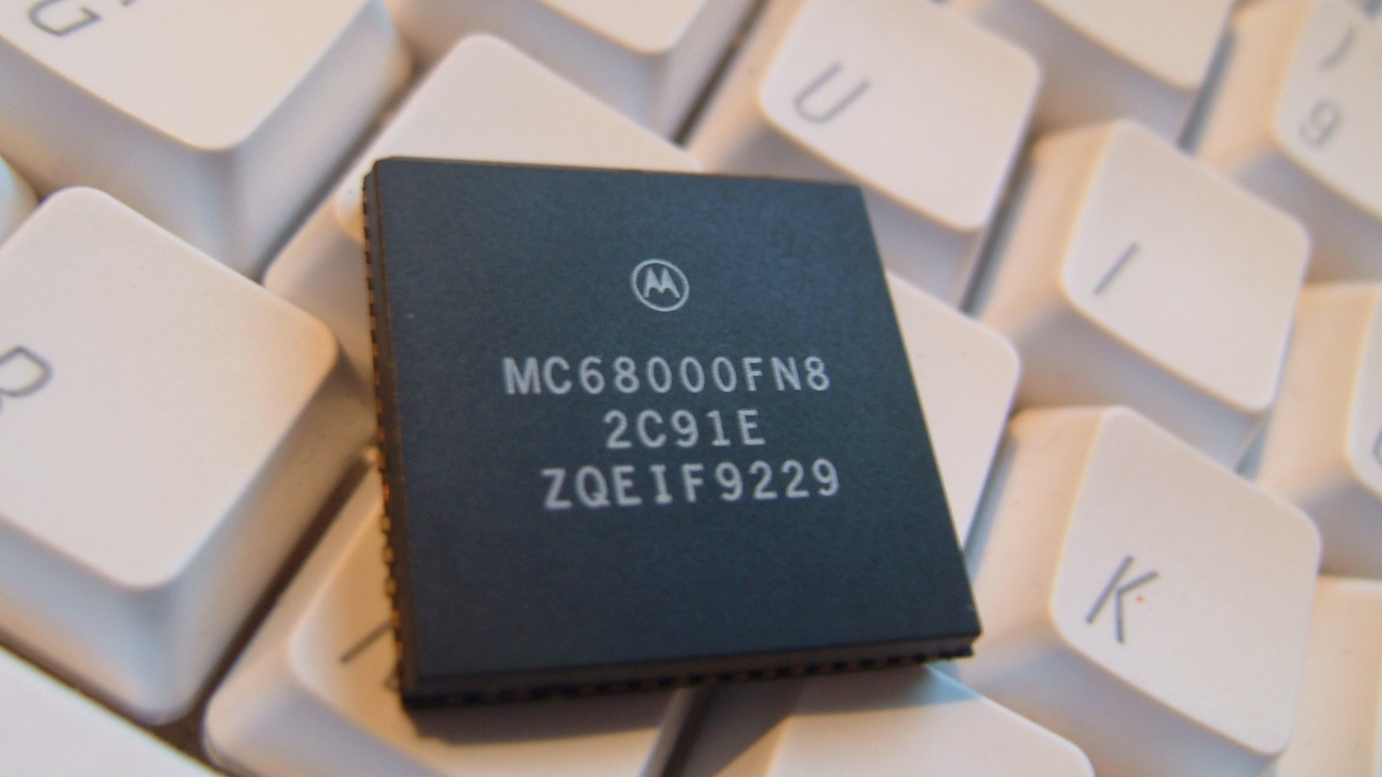 motorola 68000 chip